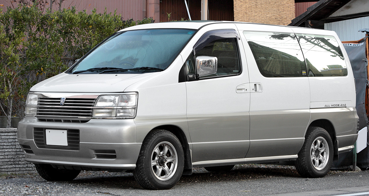 Nissan Elgrand 3.3 X 4WD ( ALWE50 )